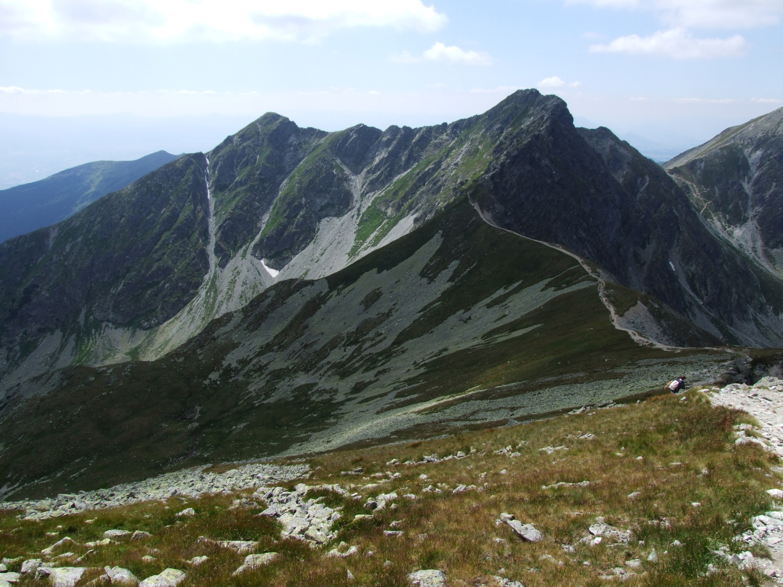 Banikov, Jalovecky prislop (Banówka, Jałowiecki Przysłop) - West Tatra Mountains